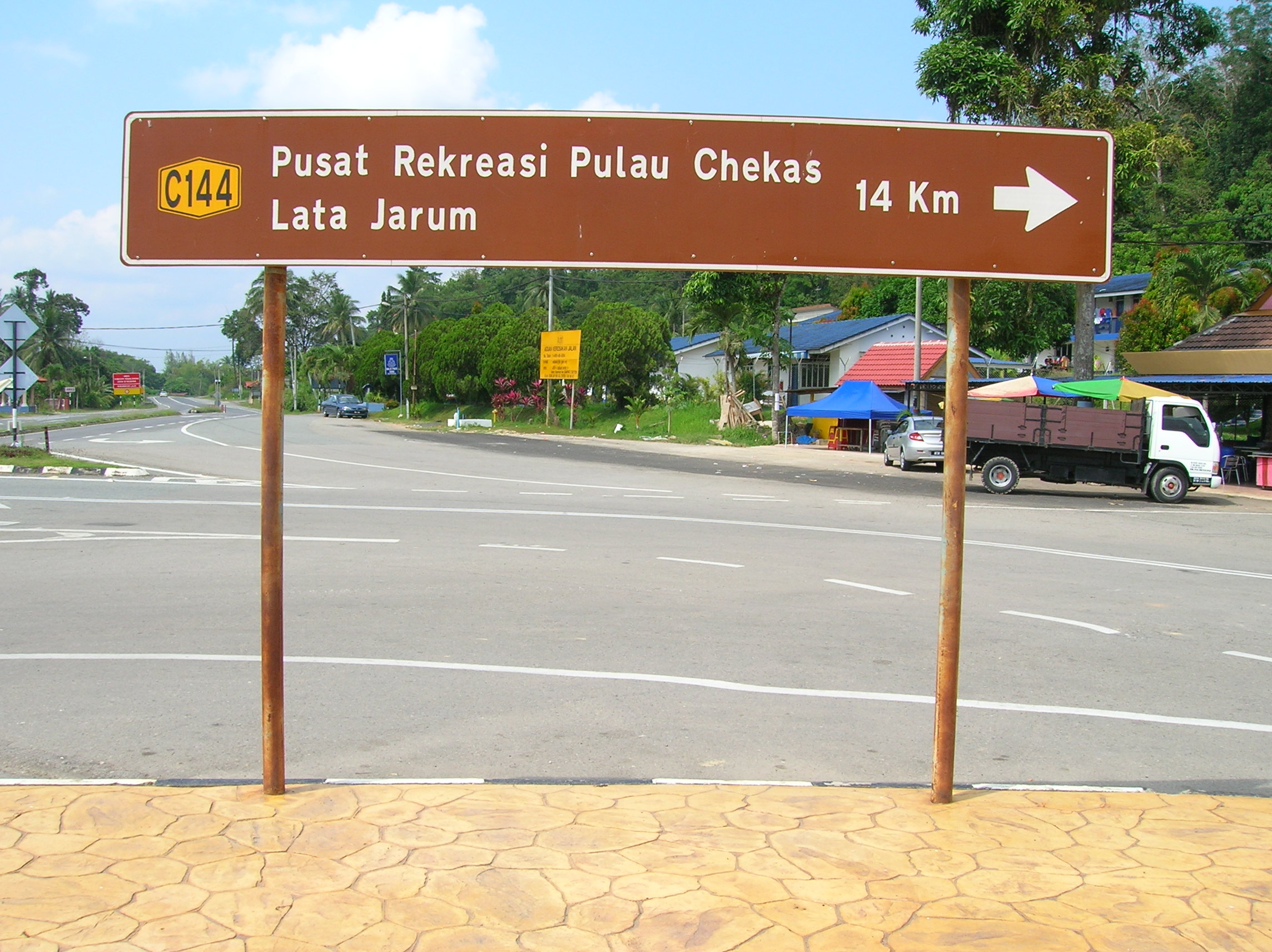 Papan tanda ini terletak di laluan Lebuhraya Gua Musang